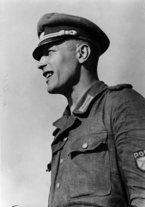 Ostvölkische Freiwillige bei der Wehrmacht Leutnant P., 1918 in Leningrad geboren. In der großen Kesselschlacht um Charkow wurde er als sowjetischer Leutnant mit seinem englischen Panzer Mark II abgeschossen und geriet in deutsche Gefangenschaft. Schon im August desselben Jahres meldete er sich freiwlillig zu einer neuen Aufgabe. Bei der POA wurde er wieder als Leutnant eingesetzt und zu einer Propaganda-Kompanie versetzt. Im Lehrgang ist er zur Schulung der Freiwilligen und als Ausbilder eingesetzt. Foto: PK-Mittelstaedt/Transocean-Europapress (G) 7.9.44 [Herausgabedatum] EM PK-H 3982